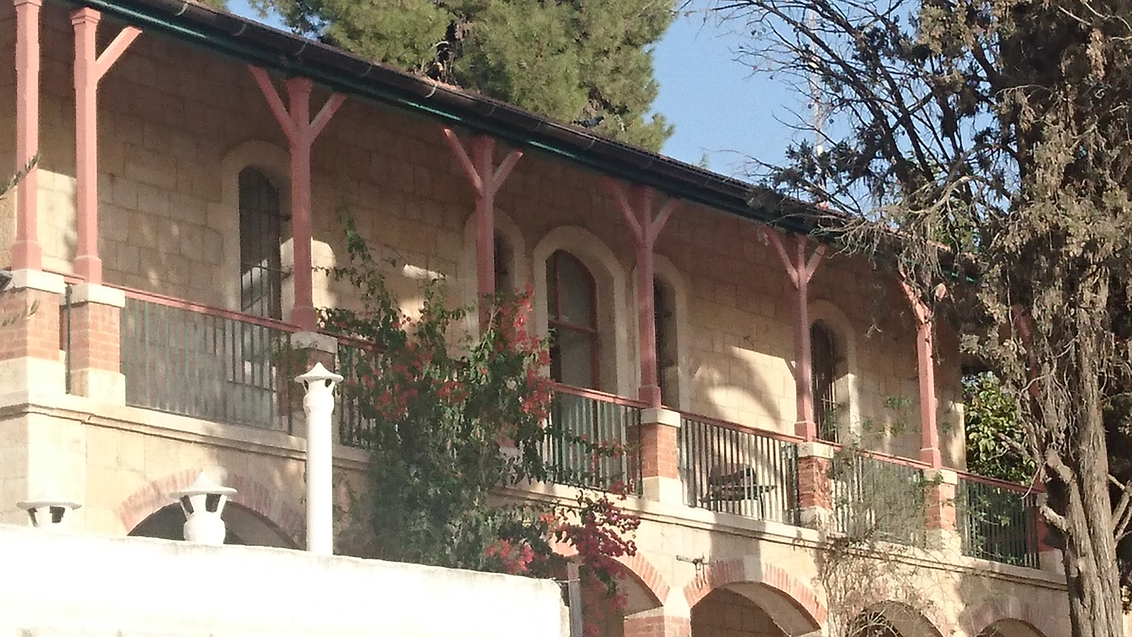 מרכז שלהבתיה רחוב שבטי ישראל 25